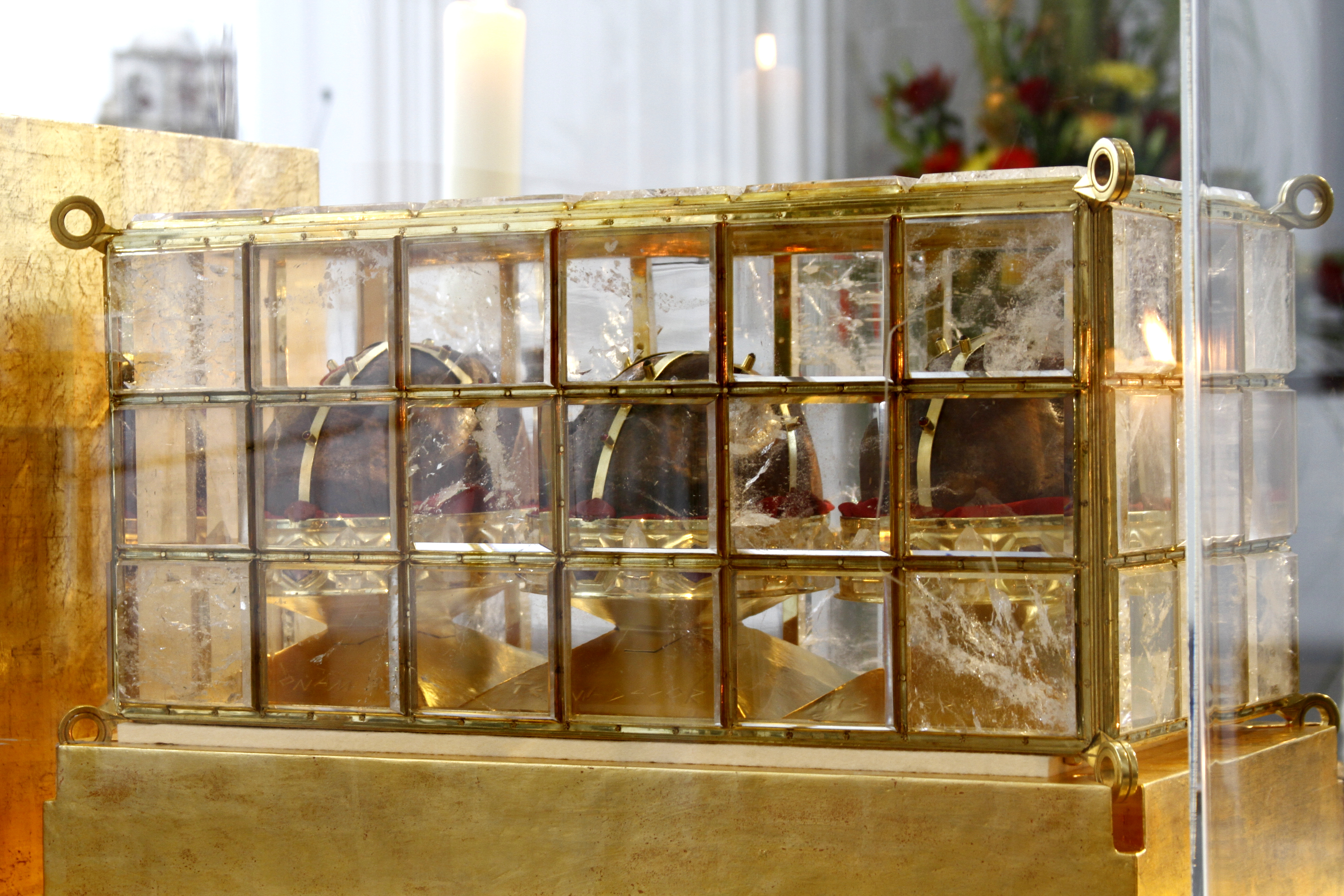 St. Kilian's Cathedral - Würzburg